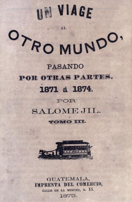 Portada del libro Un viaje al otro mundo pasando por otras partes de José Milla y Vidaurre.